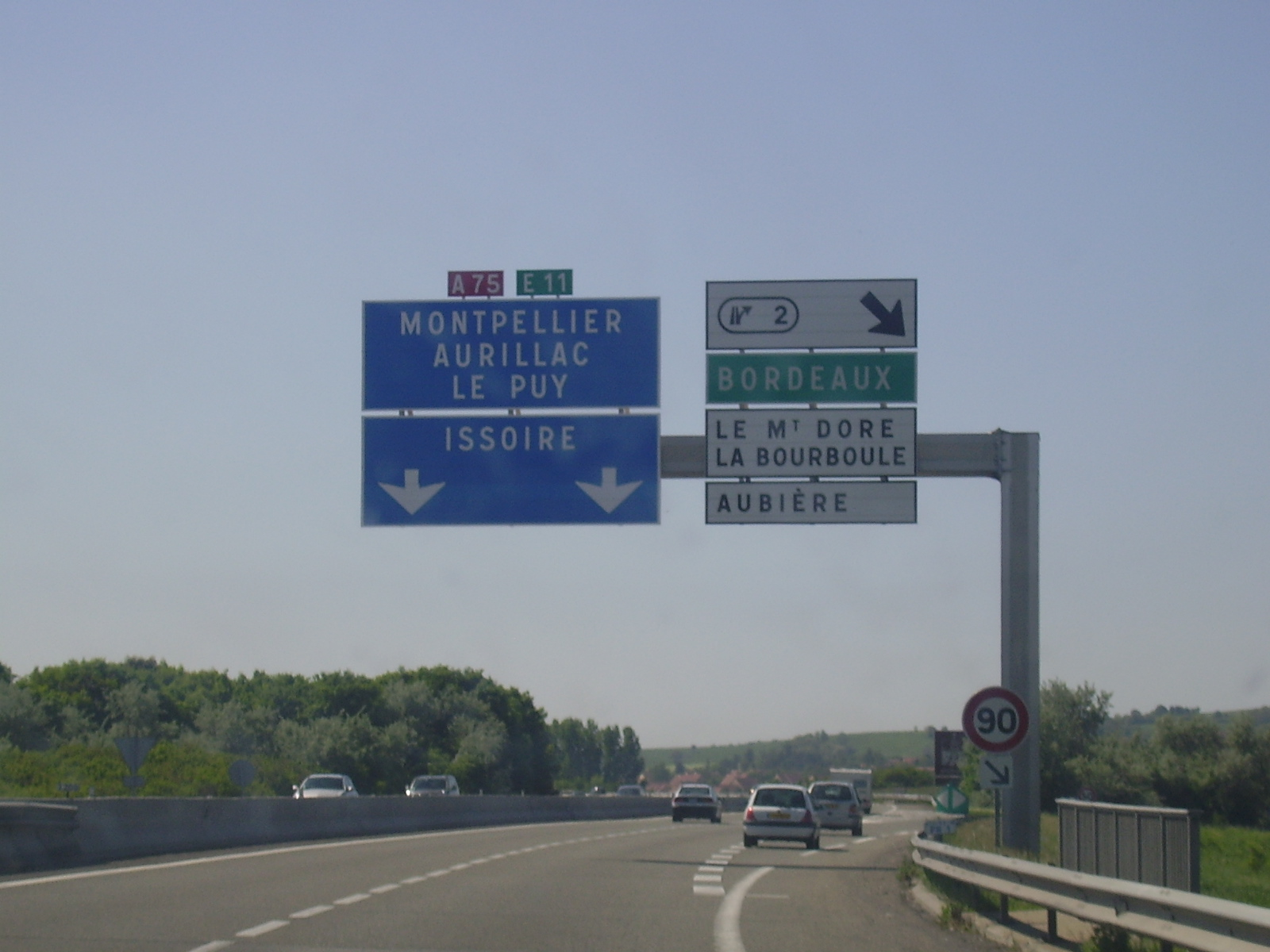 A 75 : Sortie 2 (Bordeaux / Le Mont-Dore / La Bourboule / Aubière)